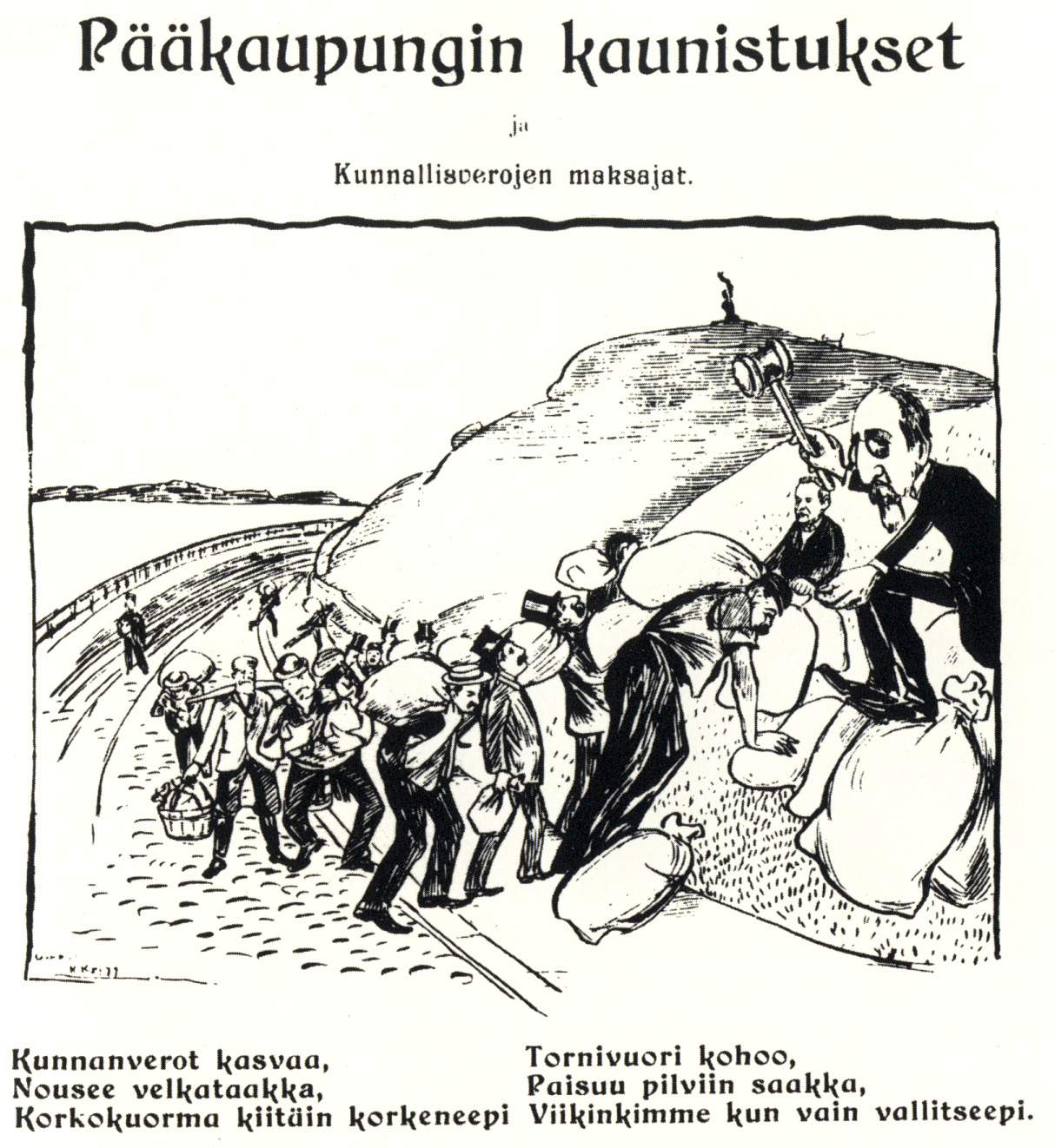 Kaarlo Karin pilapiirros Helsingin kunnallispolitiikasta ja Tähtitorninvuoren rinteiden kunnostamisesta verorahoilla; kaupunginvaltuuston puheenjohtajana Leo Mechelin; ilm. Matti Meikäläinen 3/1899.